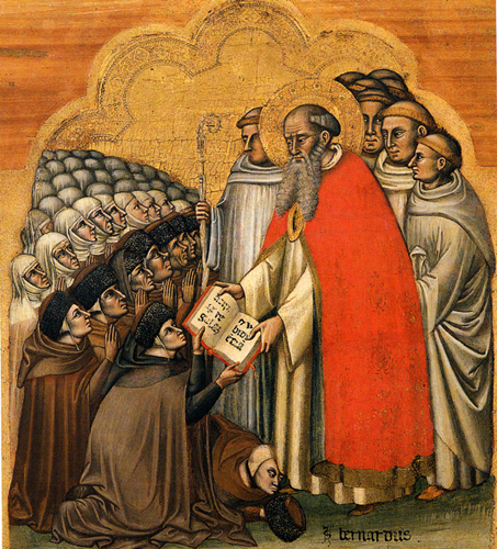 La consegna della regola agli Umiliati, Raniero da Ponza trasfigurato in San Bernardo.